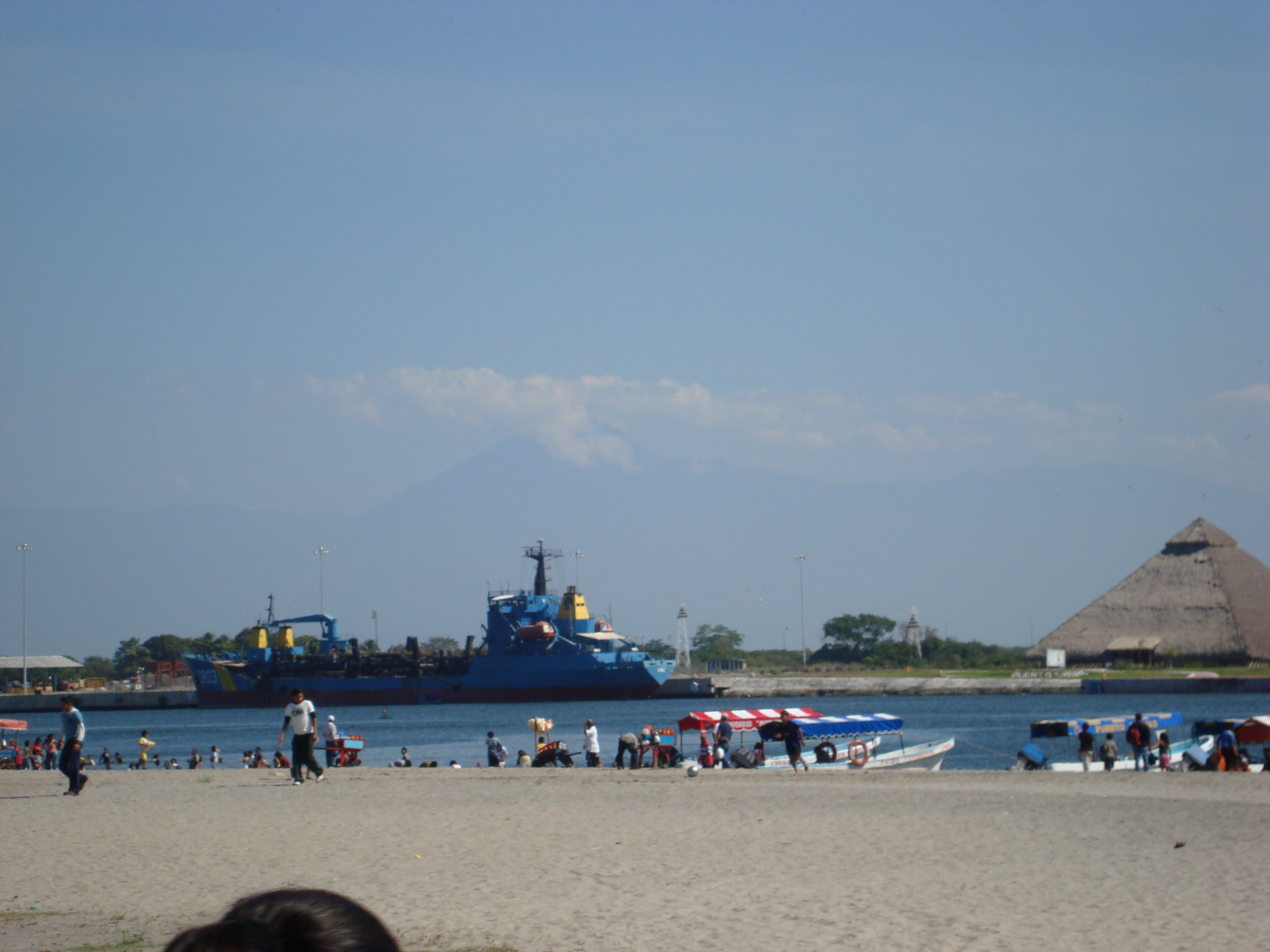 imagen de flickr.